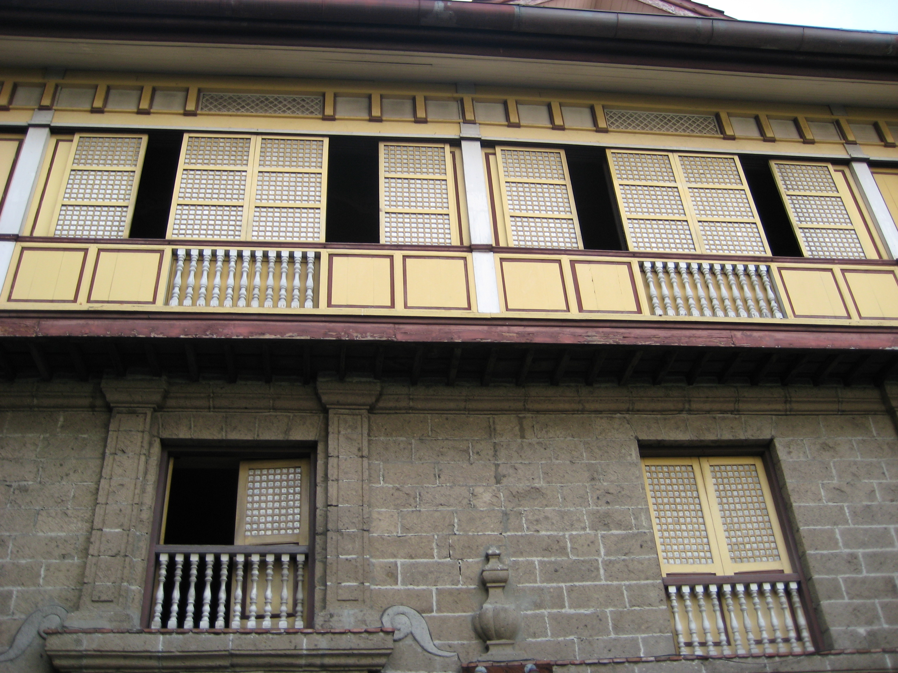 Fachada de una casa colonial en Intramuros, Manila, Filipinas